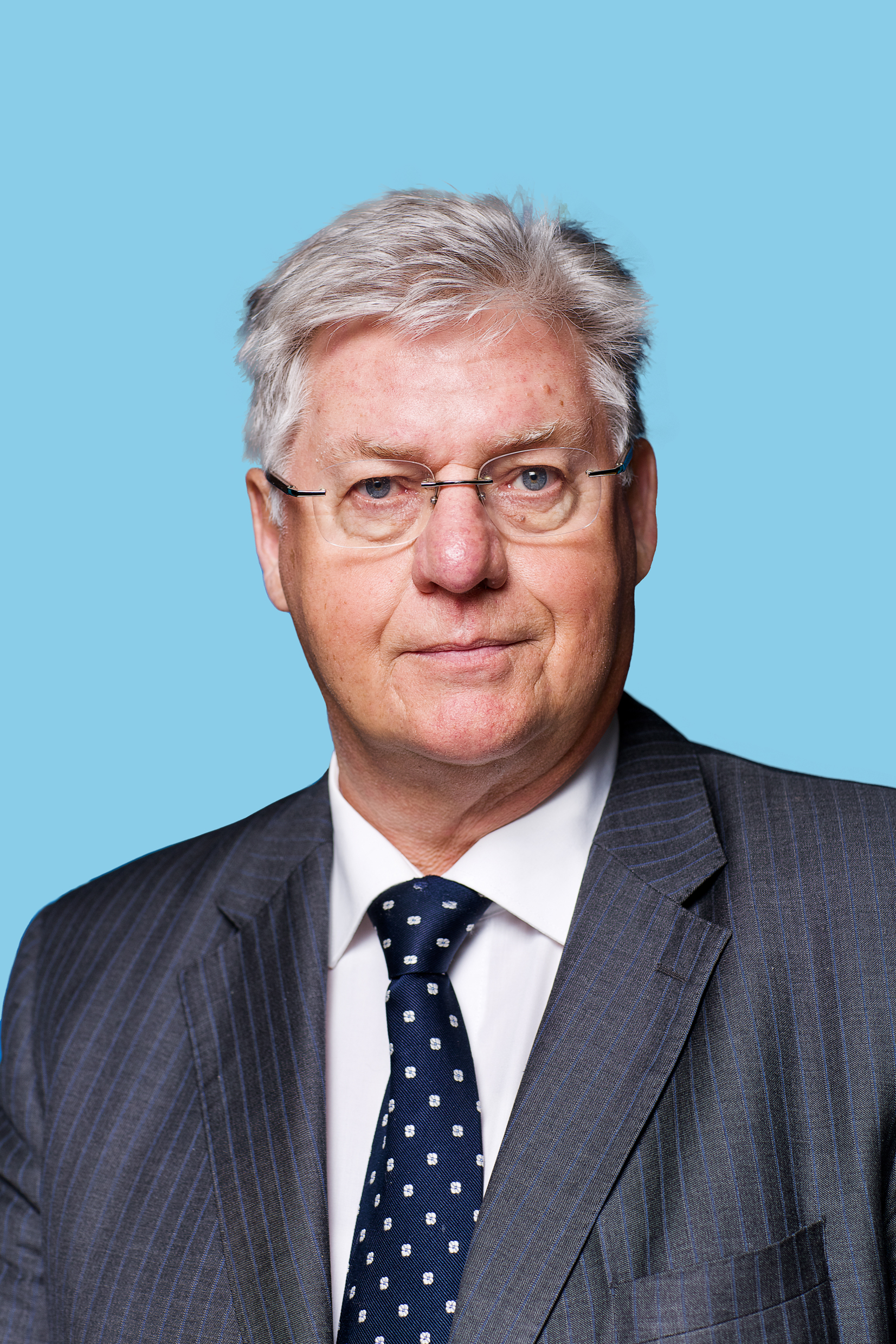 18 januari 2015. Kandidaat voor de Eerste Kamer. Op pvda.nl de volledige kandidatenlijst: bit.ly/1zpNRIG. Foto Lex Draijer.